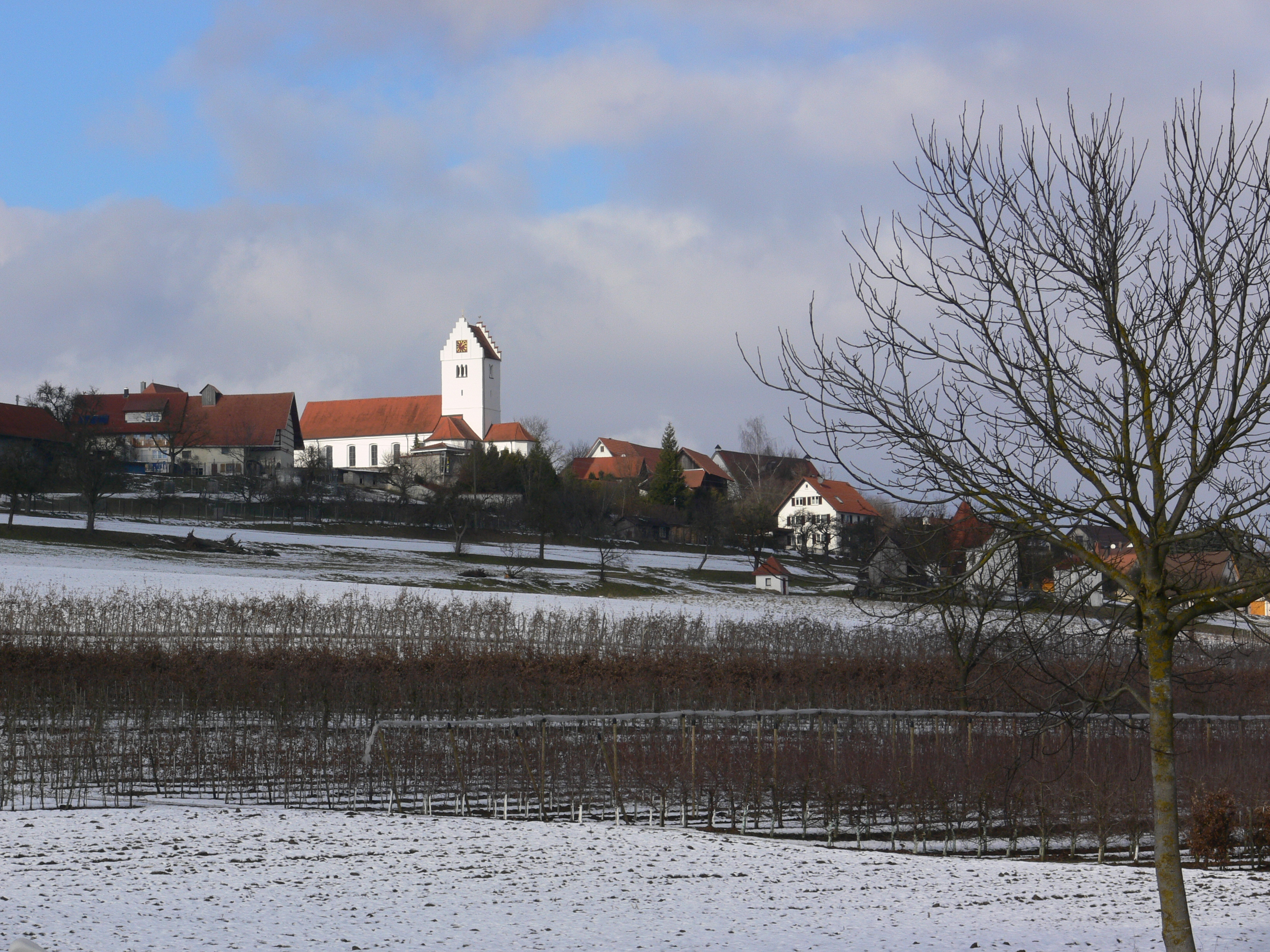 Wolpertswende, Kreis Ravensburg